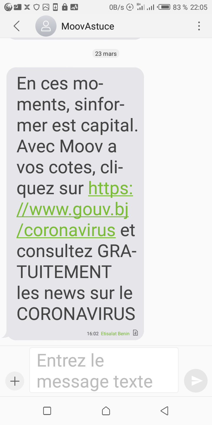 Bénin message d'alerte COVID-19 Bénin pour s'informer